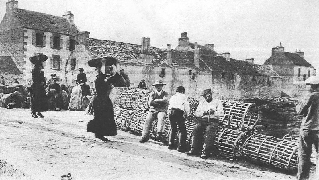 Île de Sein : Le transport de la soude par des Îliennes au début du XXème siècle